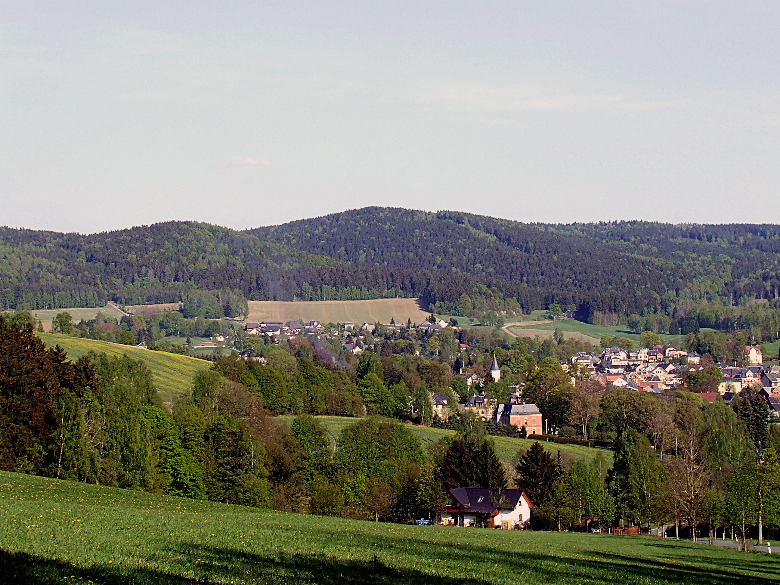 Blick auf Erlbach und die Kegelberge